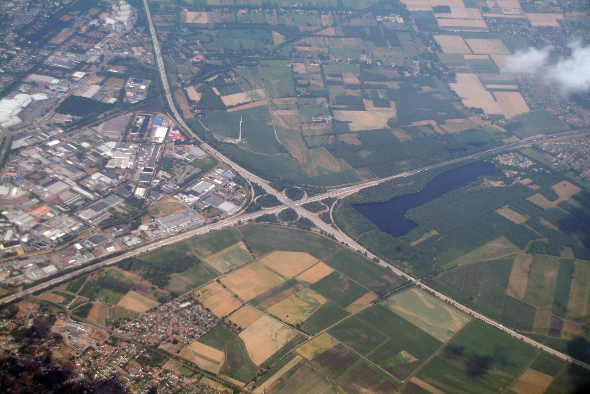 Bilder aus der Luft (Beschreibung kommt später); Bremer Kreuz; Norden liegt oben - leicht links